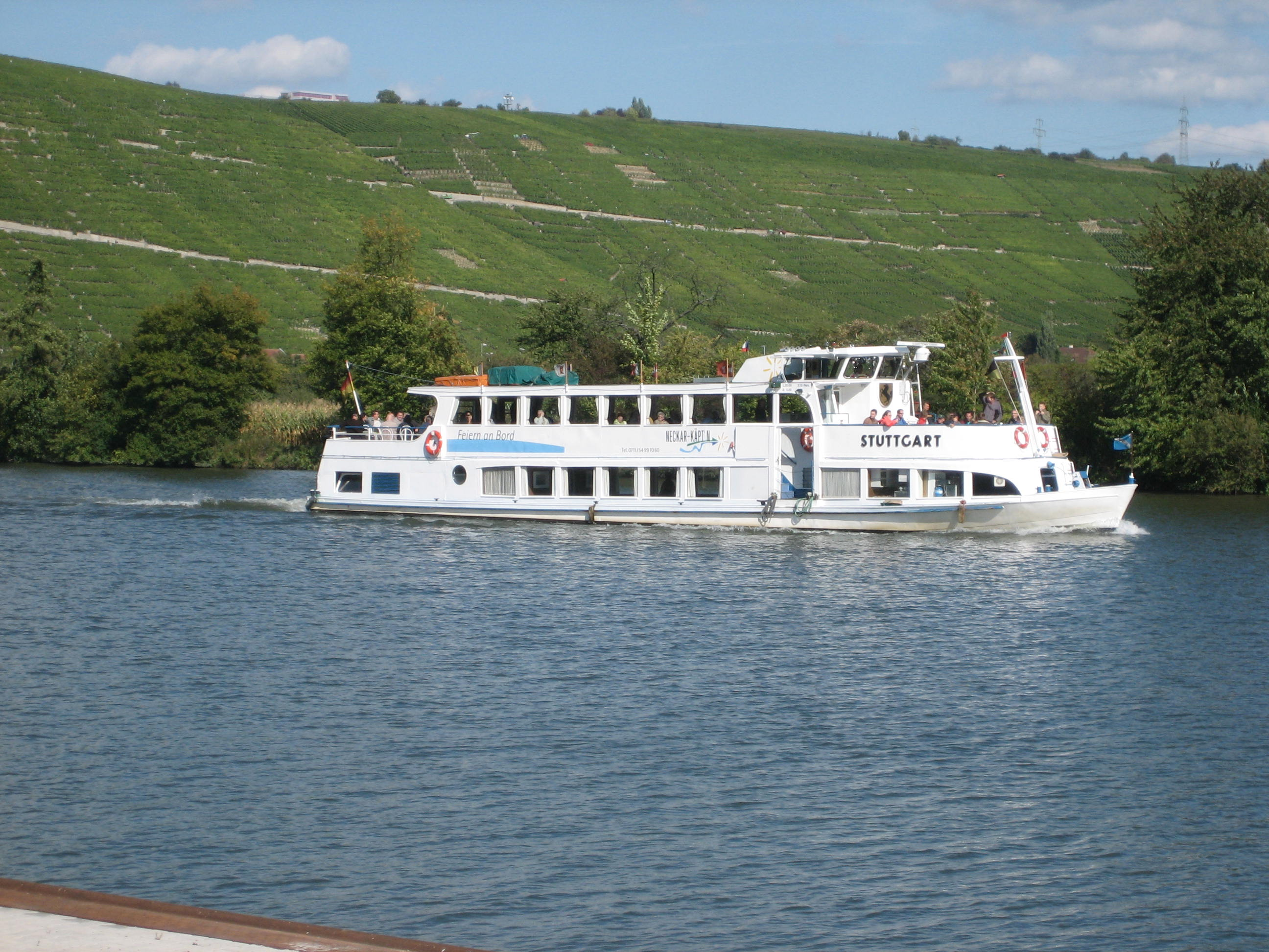 MS Stuttgart aus der Flotte des Neckar-Käpt'n unterwegs auf dem Neckar in der Region Stuttgart